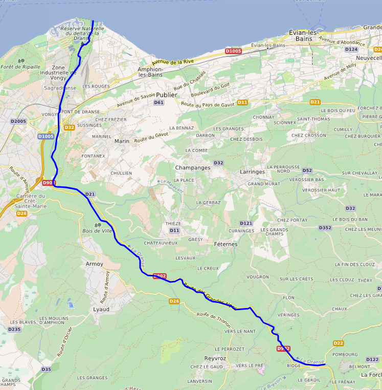 carte réalisée sur umap This map may be incomplete, and may contain errors. Don't rely solely on it for navigation.